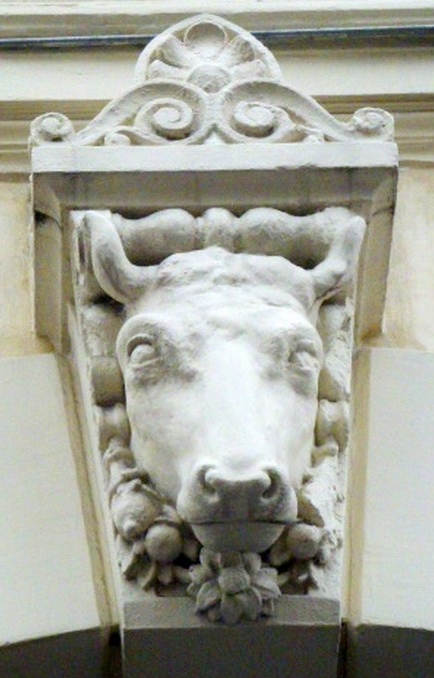 Passage Delanos 75010 Paris